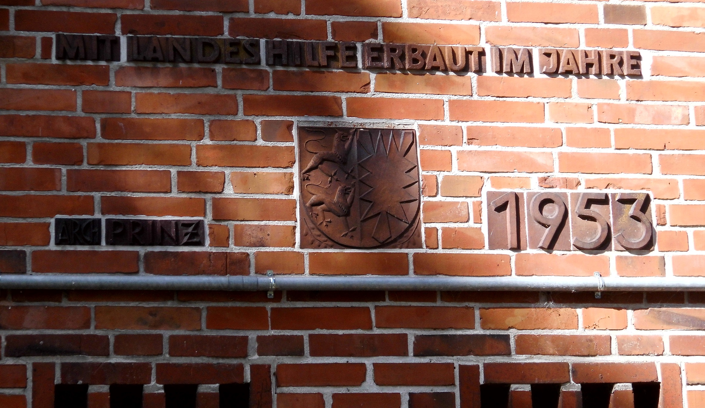 Grundschule Kiel-Suchsdorf, Fassadendetail